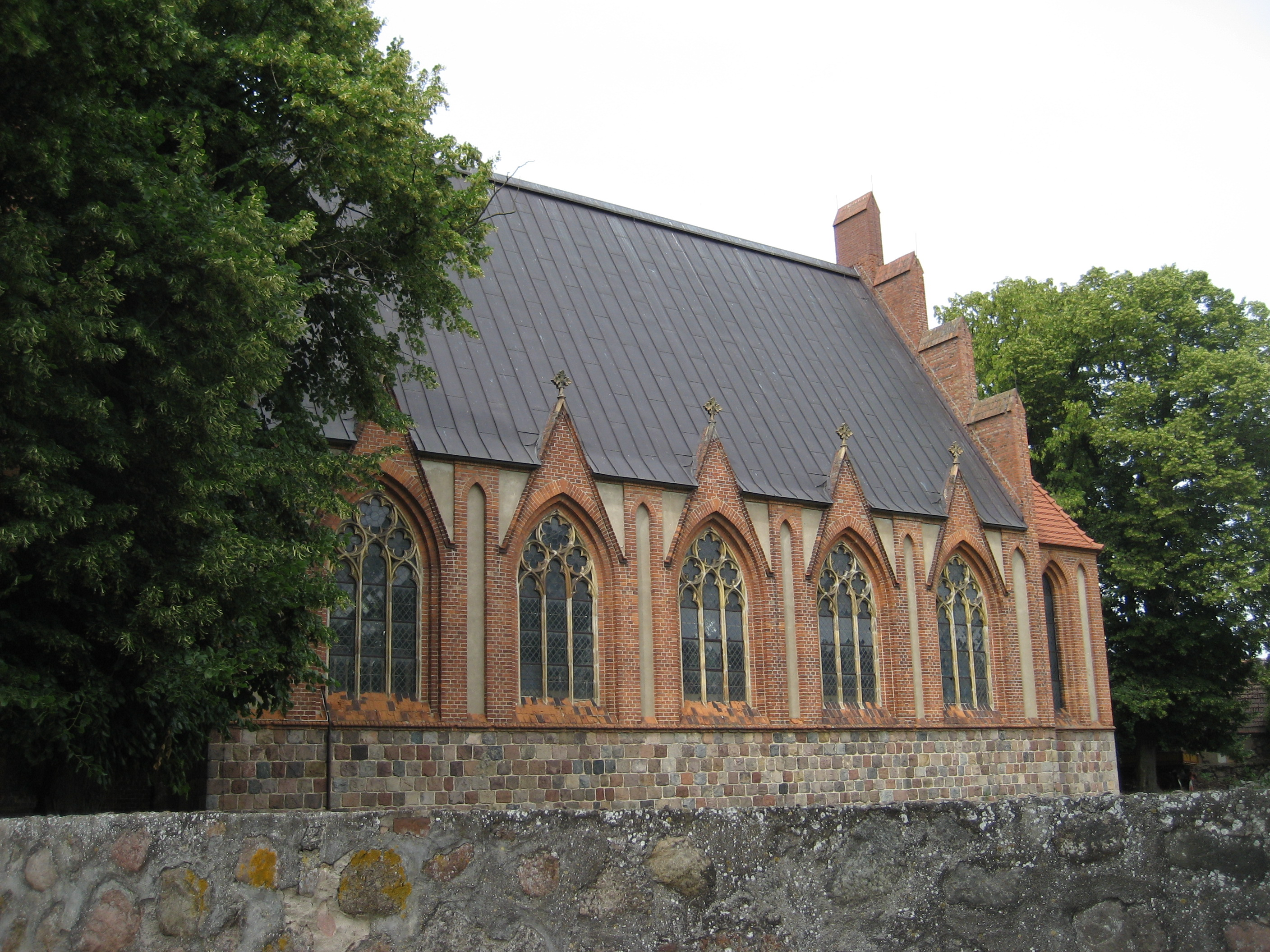 Kirche Bergholz aus Blickrichtung Süden.